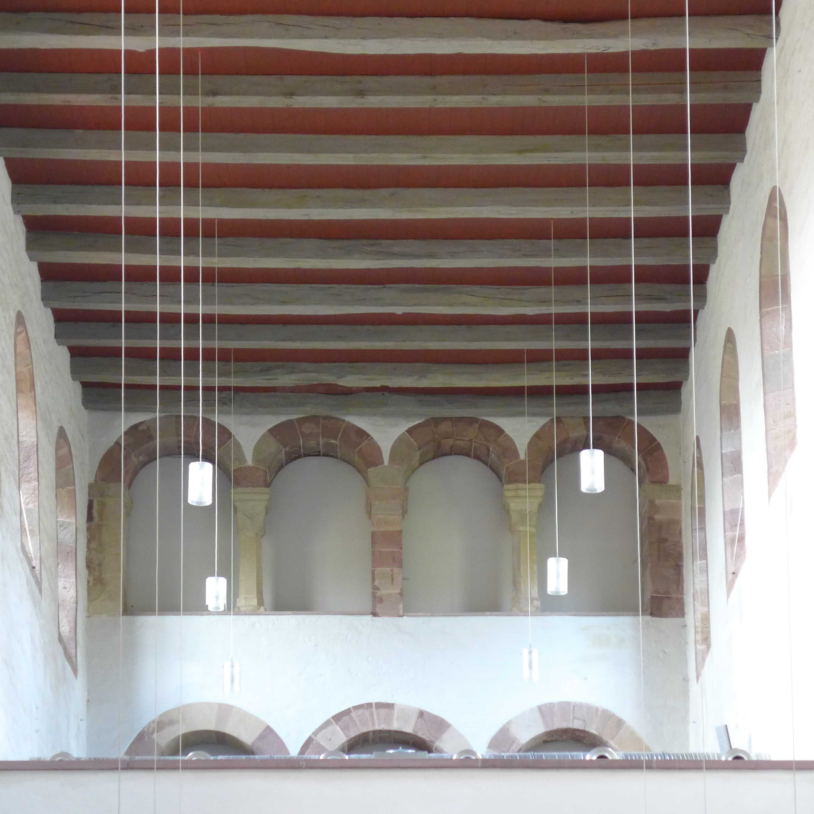 in der Kirche